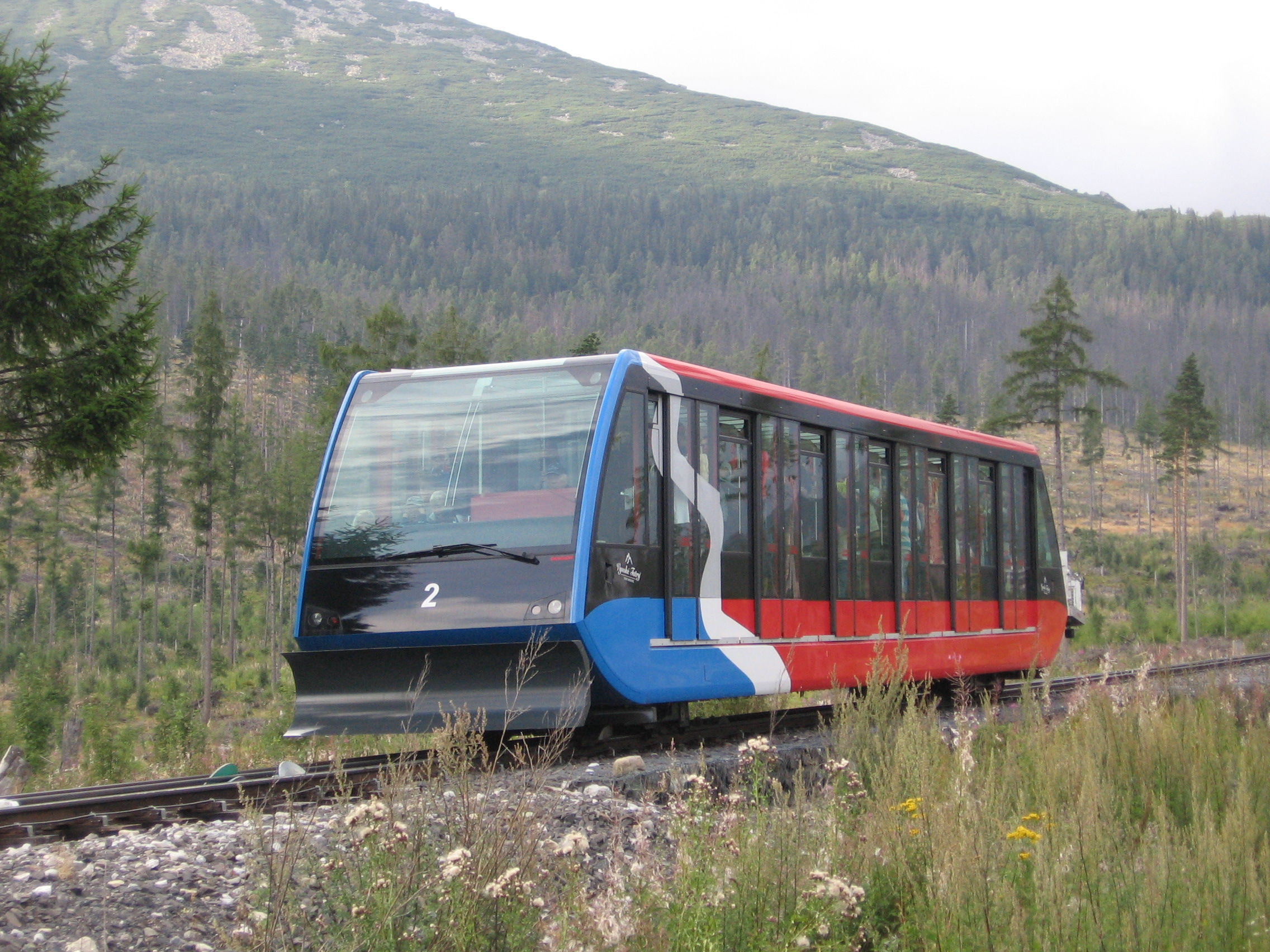 Vůz lanové dráhy na Hrebienok